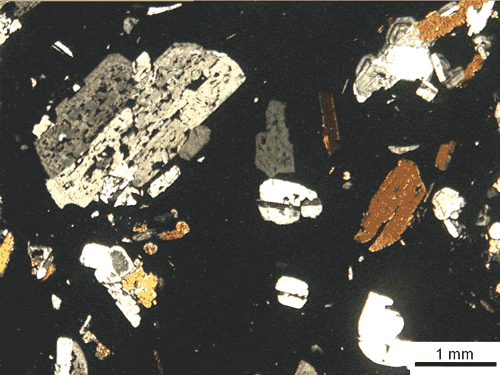 Latite. nicol incrociati